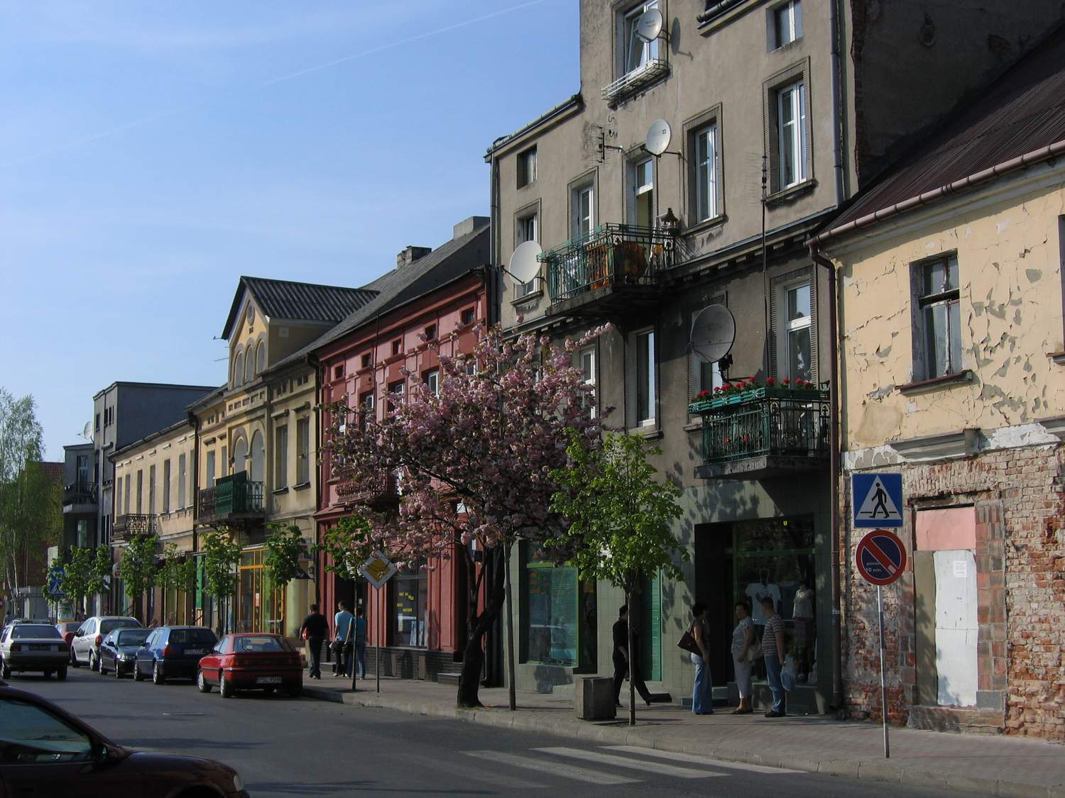 Kamienice na Placu Wolności (Rynku) w Słupcy.(foto. Marcin Majdecki)